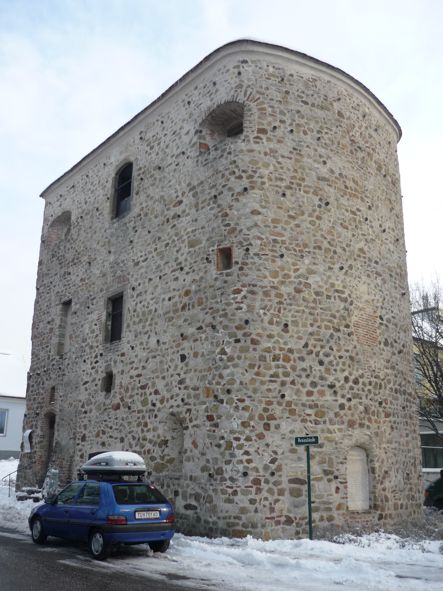 Tullner Römerturm auch Salzturm genannt - spätantiker westliche Hufeisenturm des Kastell Comagenis